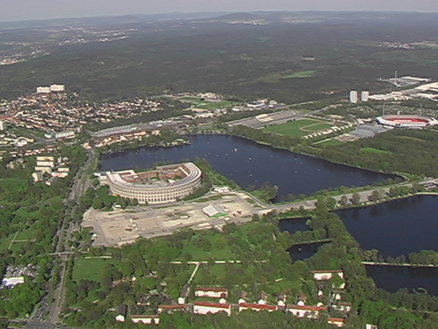 Reichsparteitagsgelände Nürnberg – Links der hufeisenförmige Torso der Kongresshalle, umgeben vom Großen Dutzendteich. Im linken hinteren Kopfbau befindet sich heute das Dokumentationszentrum Reichsparteitagsgelände und im rechten Kopfbau der Serenadenhof. Am gegenüberliegenden Ufer befindet sich das Zeppelinfeld mit der Steintribüne. Ganz rechts im Bild das Franken-Stadion, davor ist die Arena, eine multifunktionale Eissporthalle, zu finden. Im Bildvordergrund liegt der Kleine Dutzendteich mit den zwei Nummernweihern.